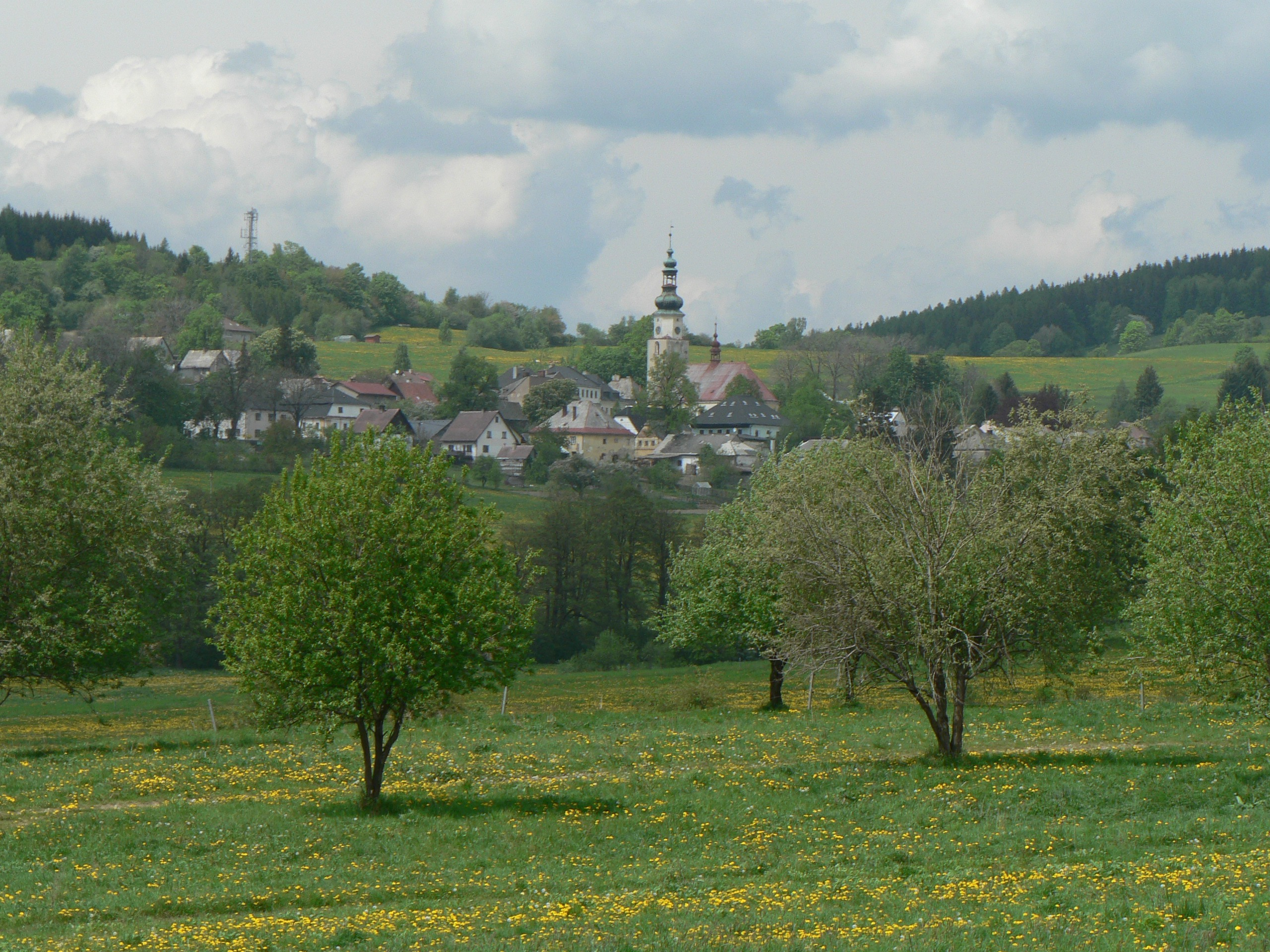 Andělská hora od jihu.